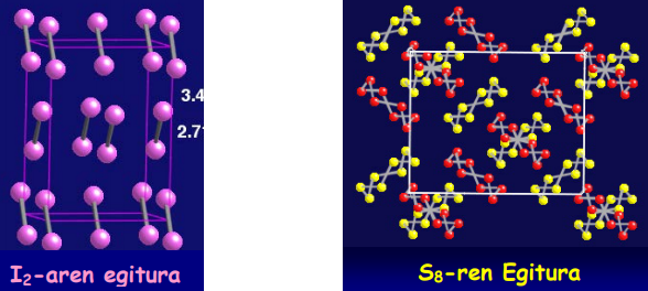 I2 eta S8-ren egiturak